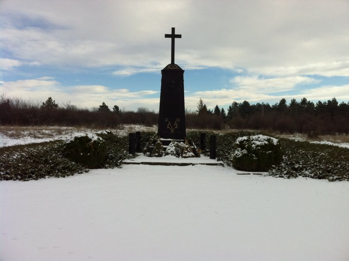 Паметник на офицерите от Лейбгвардейски егерски полк, загинали на 12 (24) октомври 1877 г. при атаката на редутите при с.Телиш